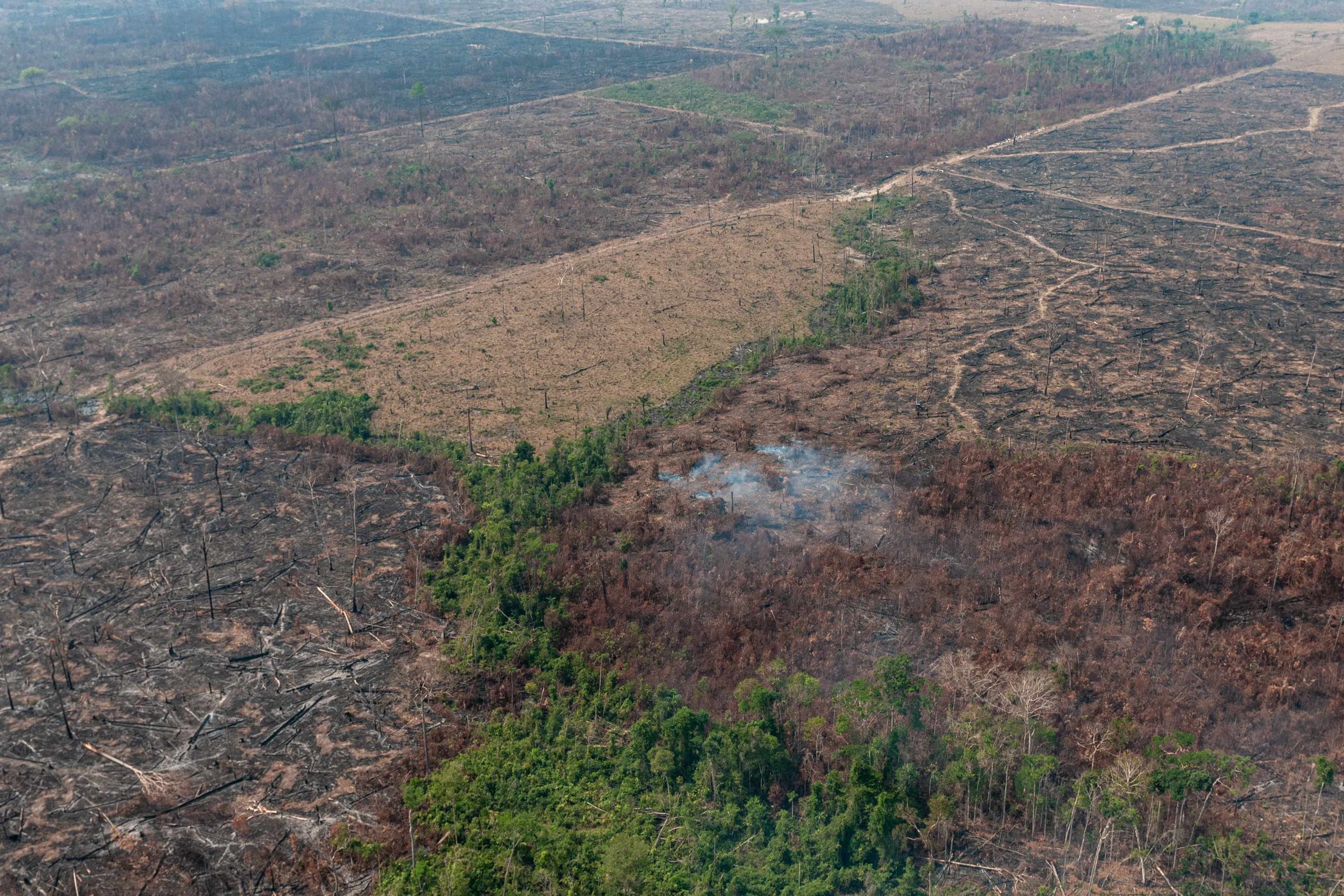 Brigadistas do Prevfogo/Ibama participam de operação conjunta para combater incêndios na Amazônia Foto: Vinícius Mendonça/Ibama